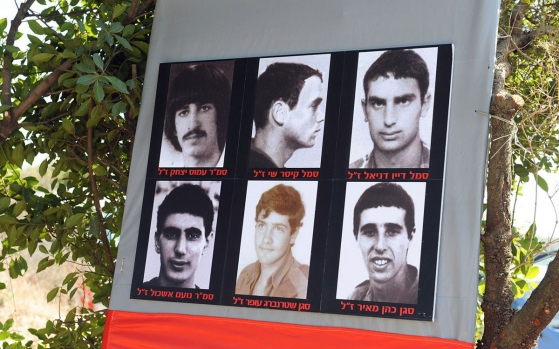 לוחמי פלוגת הרב"טים שנפלו במלחמת לבנון